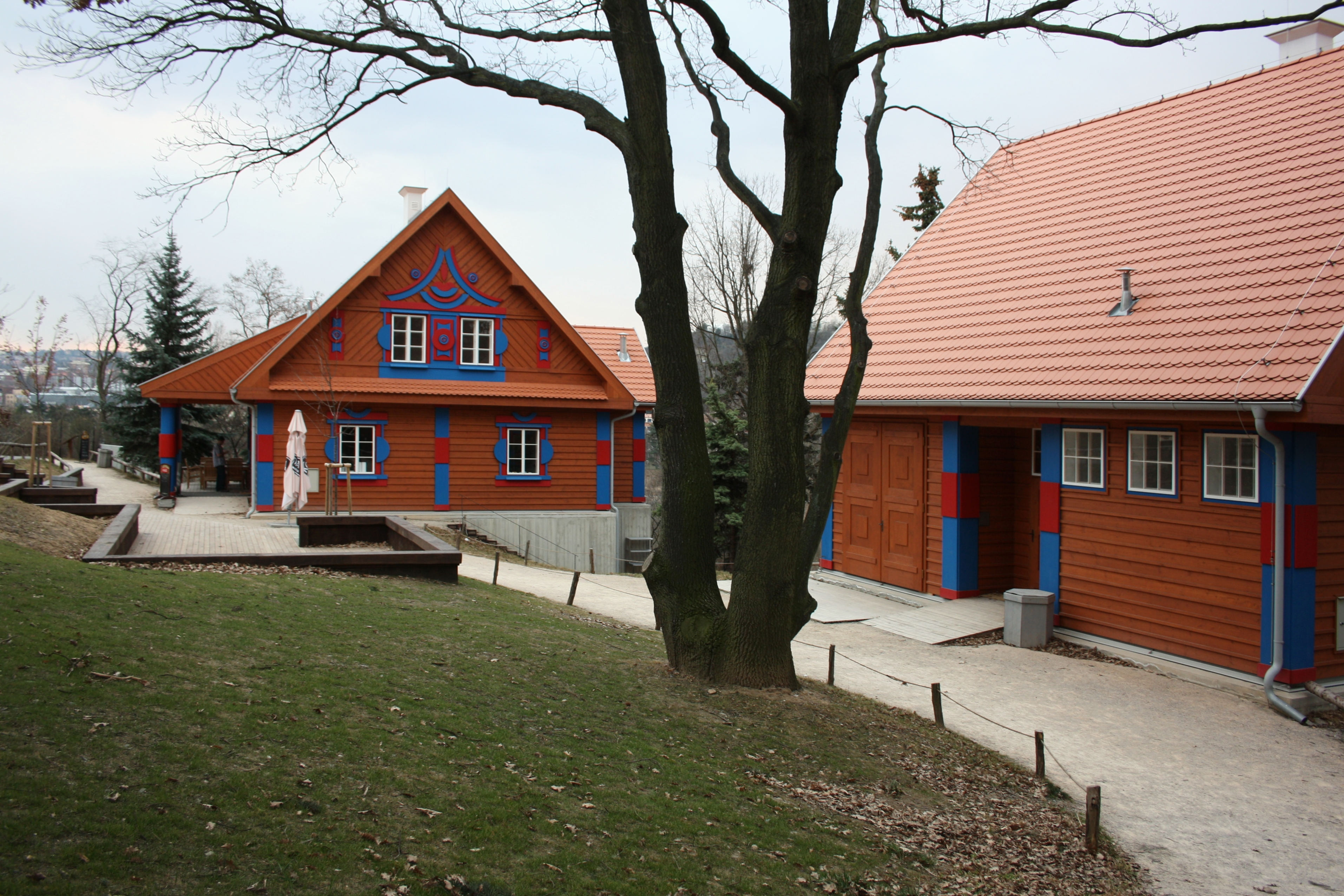 Pražská zoologická zahrada